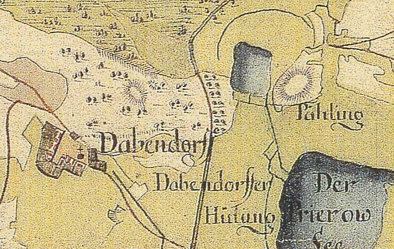 Dabendorf auf der Schmettau'schen Karte von 1767-87, Dabendorf, Stadt Zossen, Brandenburg, Deutschland